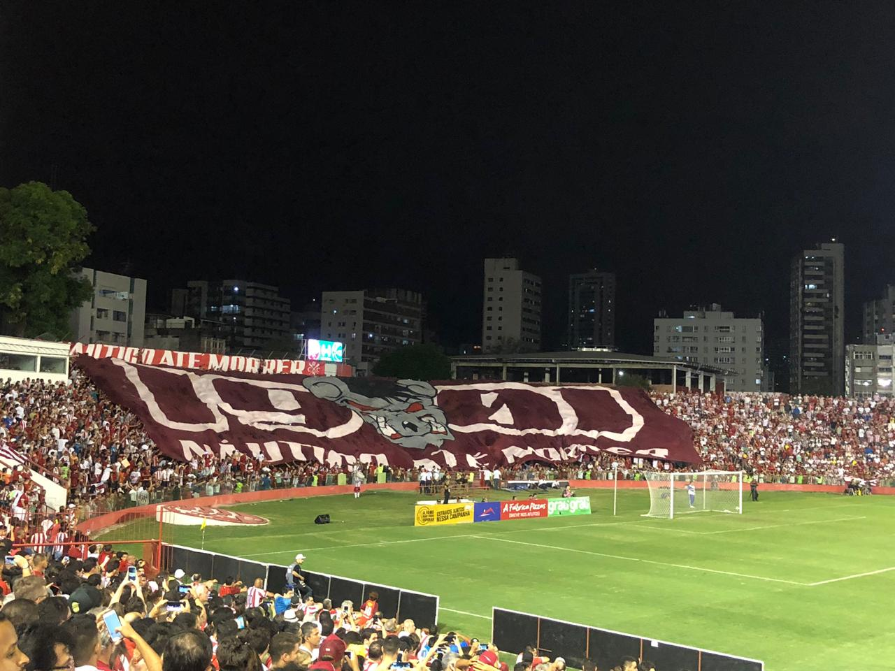 Torcida do Náutico